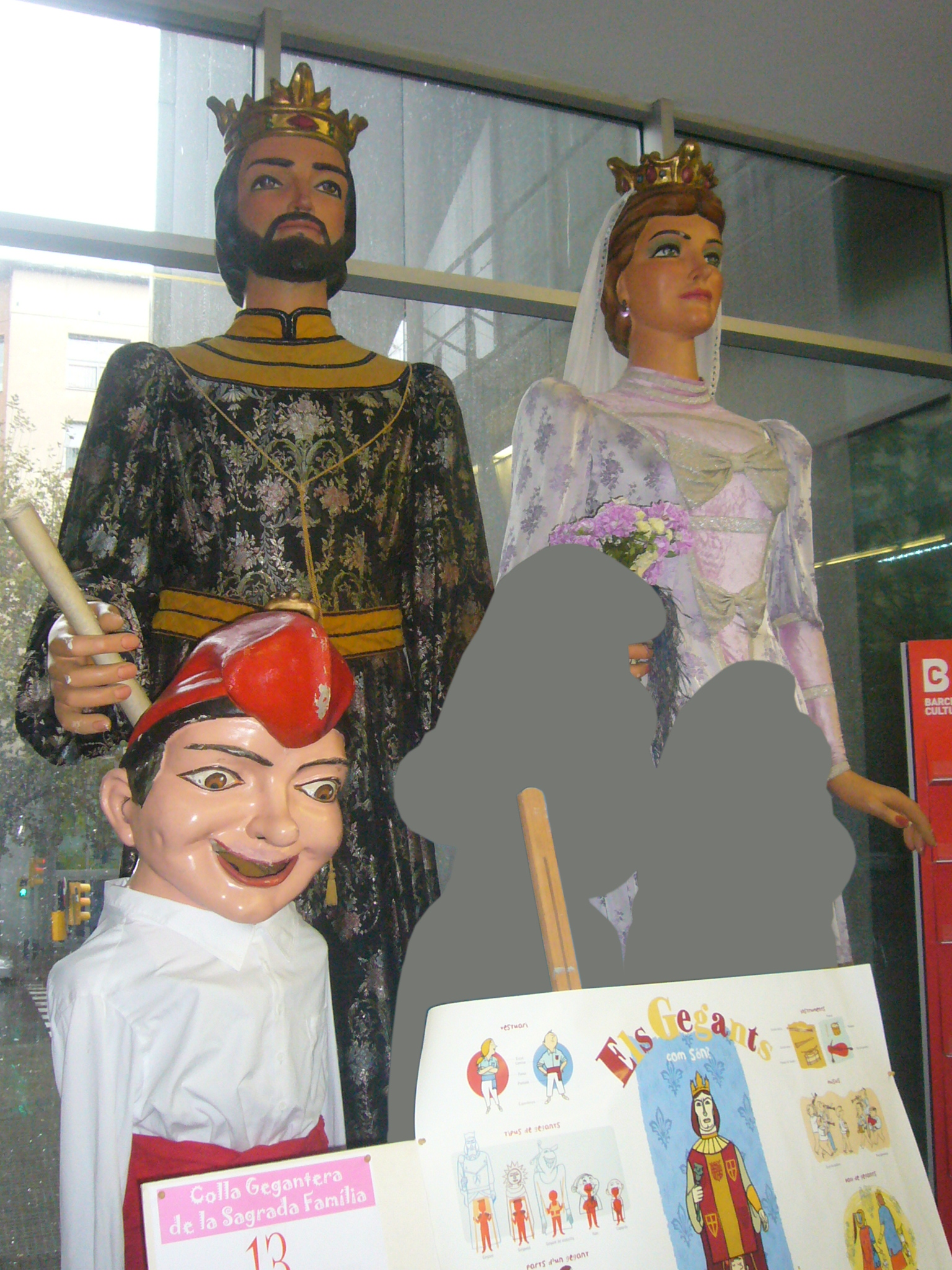 Gegants de Sant Josep Calassanç. Noms: Quintí i Peguera Data d'estrena: 6 de juny de 1982. Constructor: Domènec Umbert i Vilasseró. Restaurats el 1999 per Manuel Casserras i Soler. Propietat: parròquia de Sant Josep de Calassanç (barri El Camp de l'Arpa del Clot). Dades tècniques: Ell (rei): 48kg i 3,85m. Ella (reina): 45kg. i 3, 83m. Capgròs català: Data d'estrena: 1980. Constructor: Domènec Umbert. Capgrossos Barrufets: Data d'estrena: 1982. Constructor: Domènec Umbert.